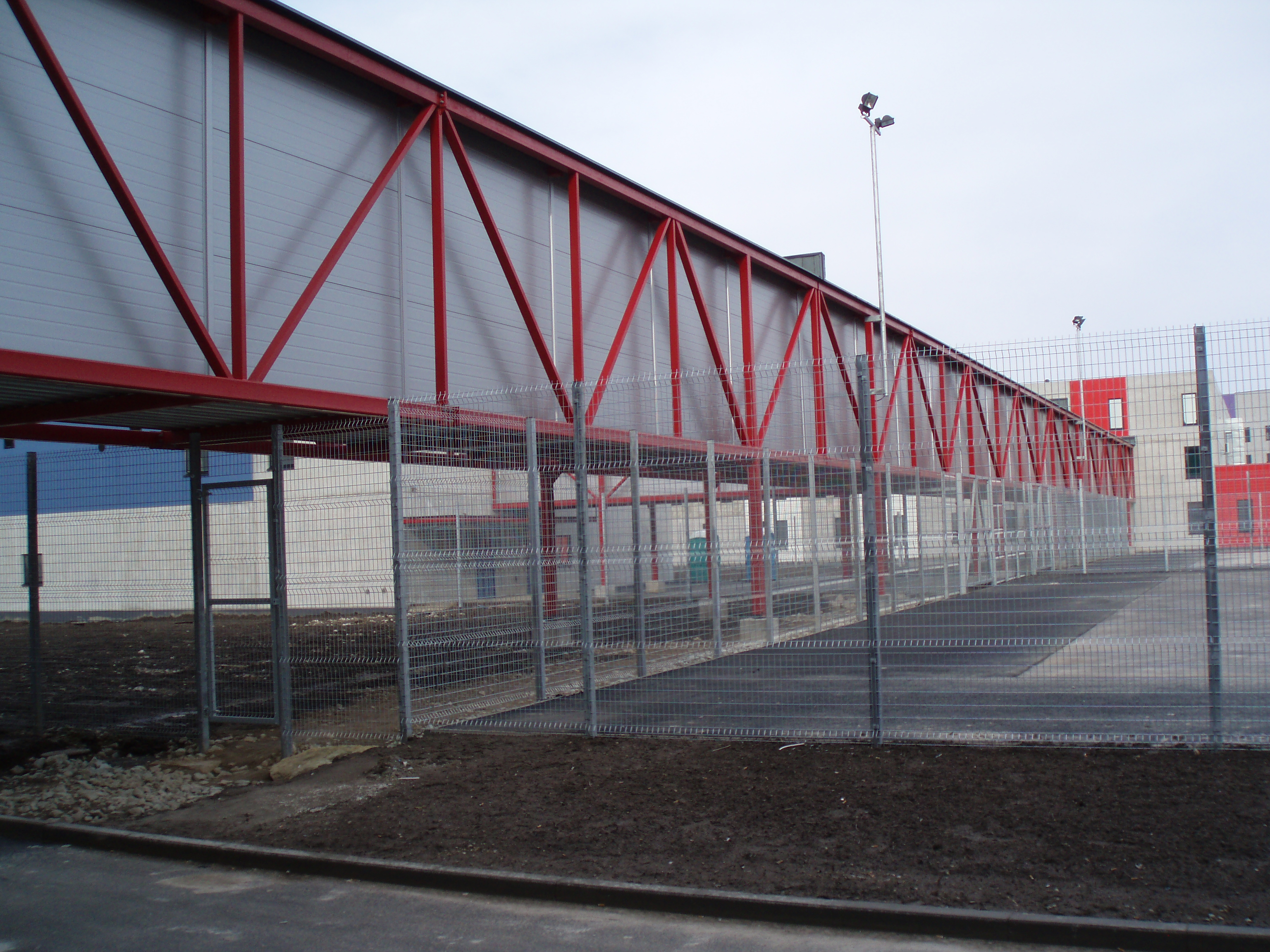 Viru Prison, Estonia